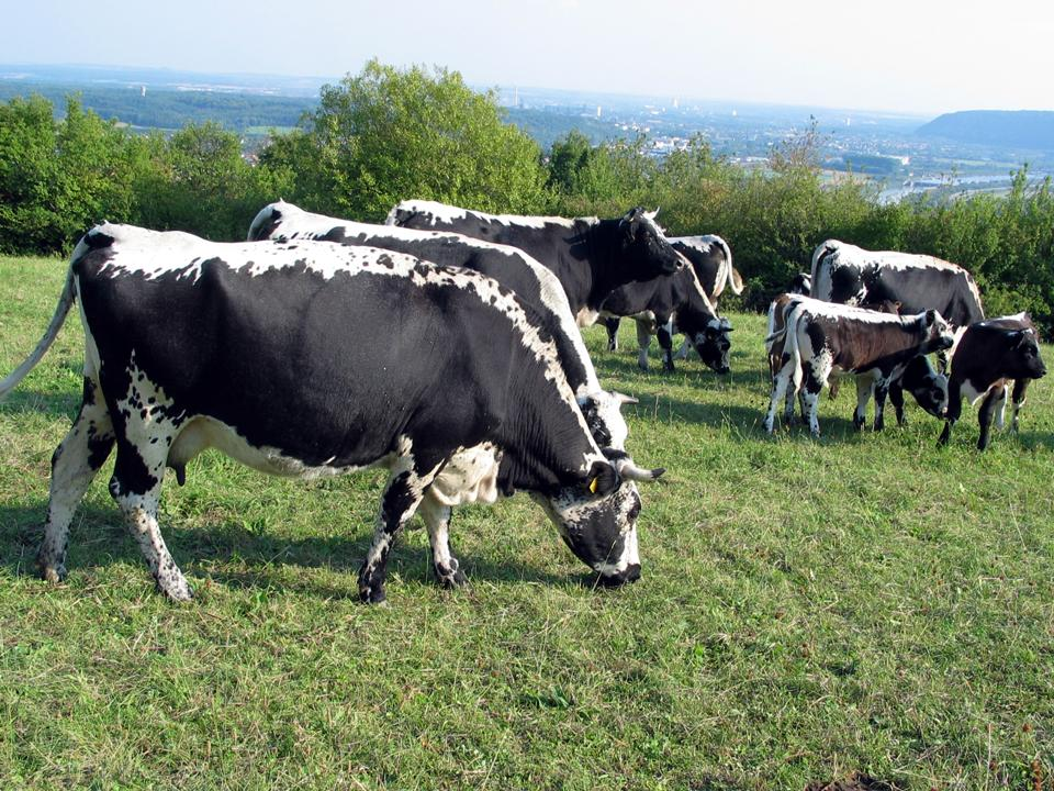 Mutterkuhherde Vogesenrinder. Standort im Naturschutzgroßgebiet "Wolferskopf" nahe der saarländischen Stadt Merzig. Im Hintergrund links ein Teil des Saargaus.